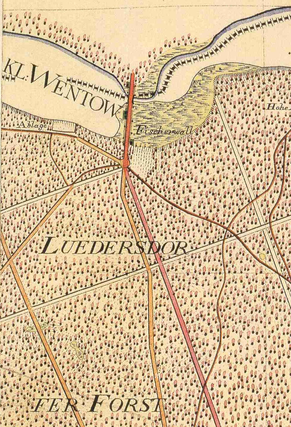 Fischerwall, Wohnplatz im Ortsteil Seilershof der Stadt Gransee, Landkreis Oberhavel, Brandenburg, Ausschnitt aus dem Urmesstischblatt 2945 Mildenberg von 1825